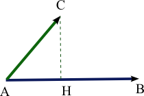 Produit scalaire des vecteurs AB et AC (version 1). Author HB.